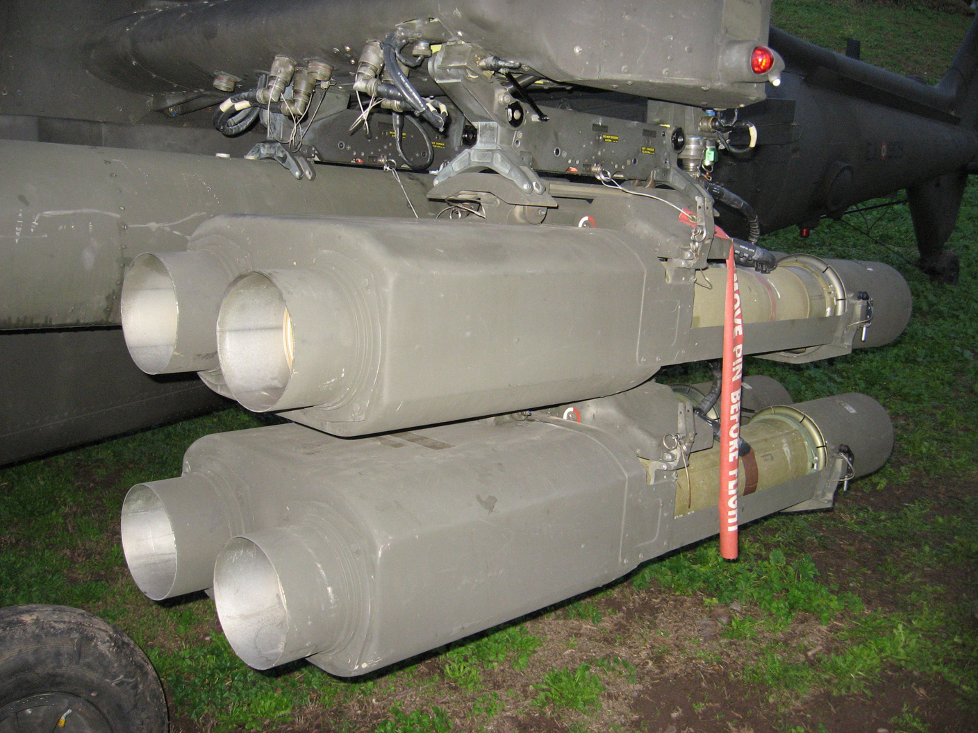 Pod per missili HELITOW dell'Agusta A.129 Mangusta, fotografato in occasione della Festa delle Forze Armate. L'esemplare era in esposizione pubblica al circo Massimo (Roma).